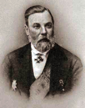 Pavel Ivanovich Melnikov